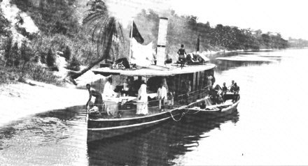 Origine : Image XIXe siècle.